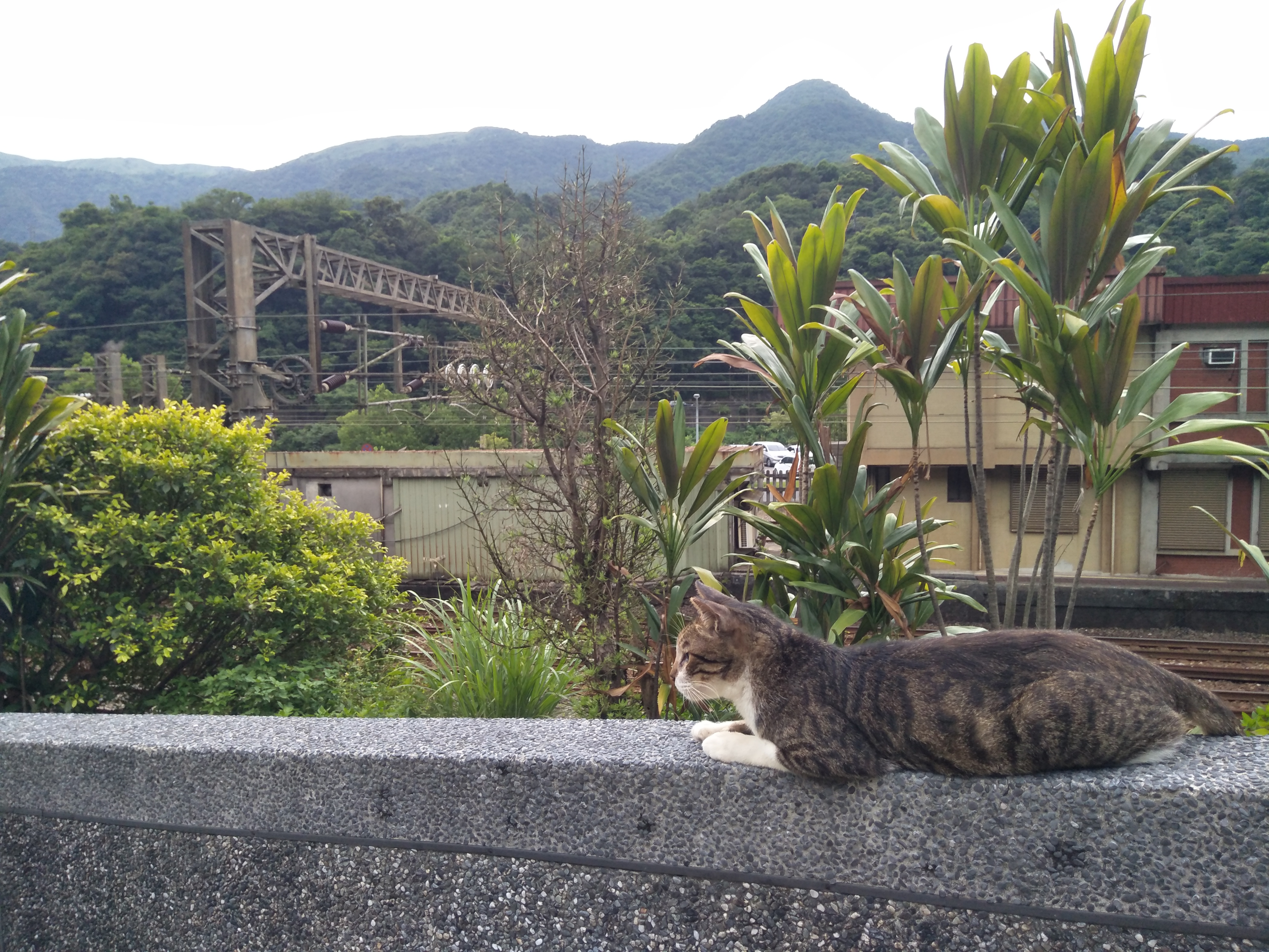 猴硐貓村的貓與猴硐山景